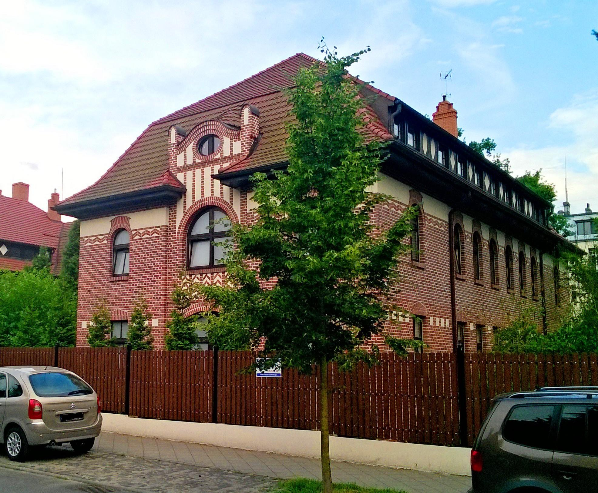 Budynek przy ul. Słowackiego 45 w Toruniu1